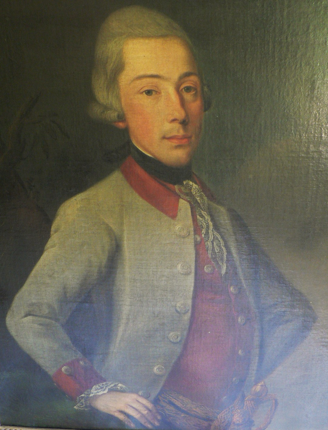 Original Ölgemälde von Joseph Ignaz von Buol-Berenberg (1749-1817), Öl auf Leinwand,rückseitig beschriftet.